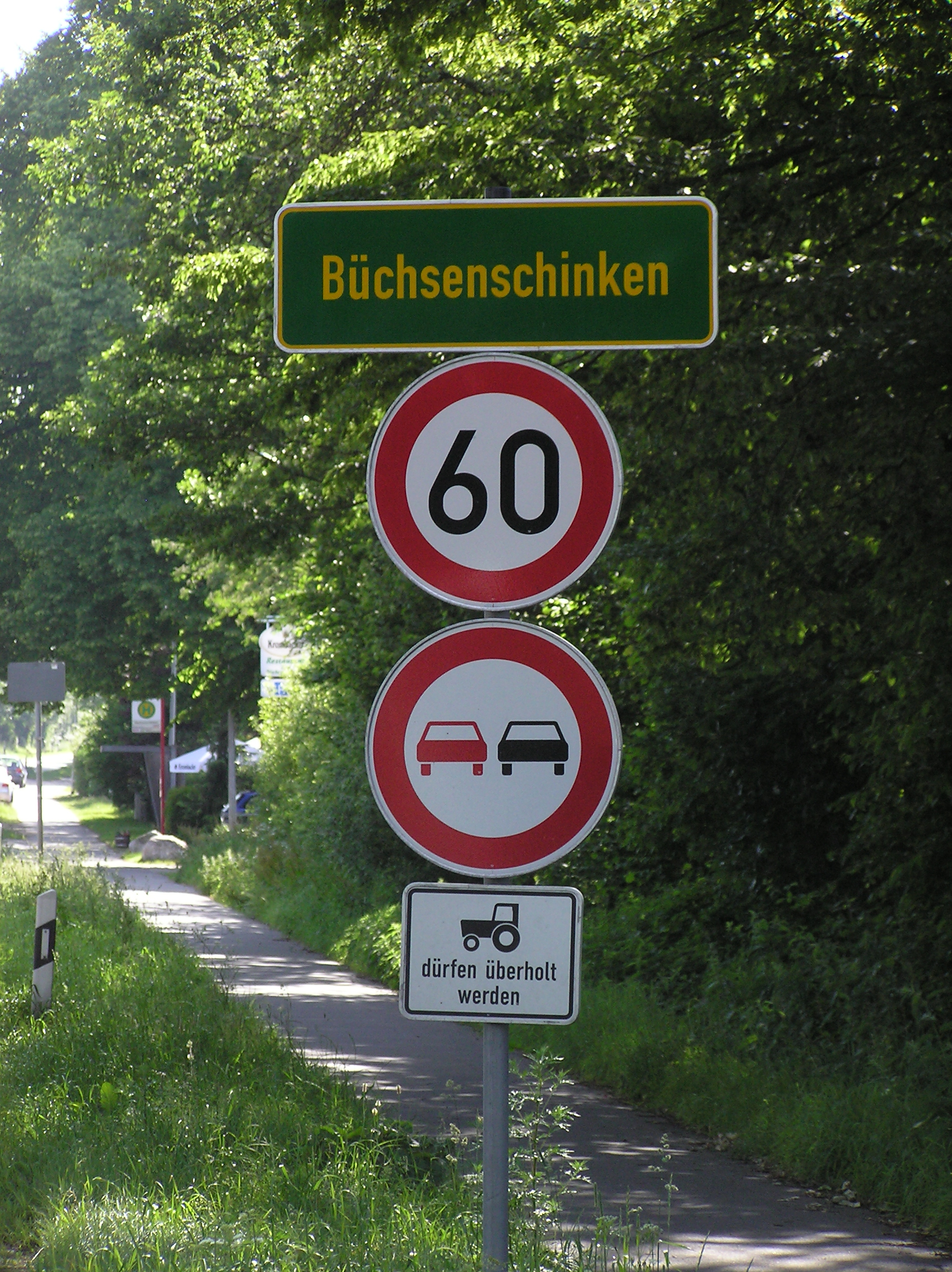 Ortsteilschild Büchsenschinken (Ortsteil von Reinbek)